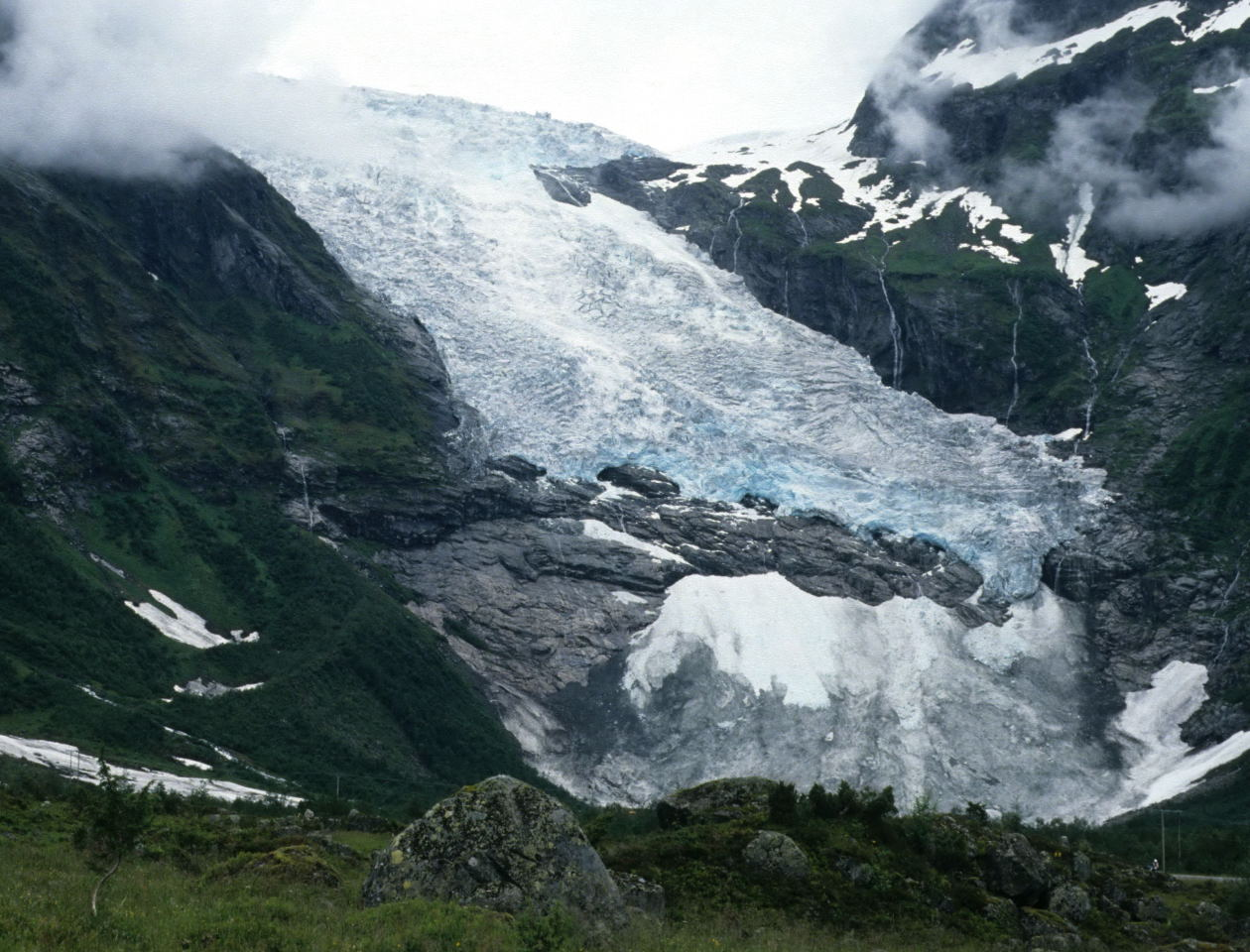 Bøyabreen i Fjærland, Sogndal kommune